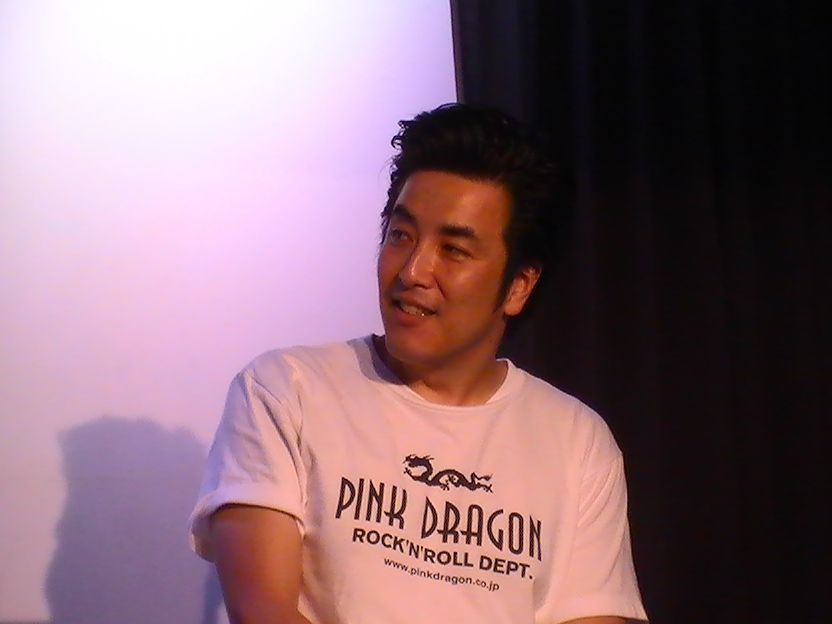 TAIGA (日本のお笑いタレント 2017年5月22日)